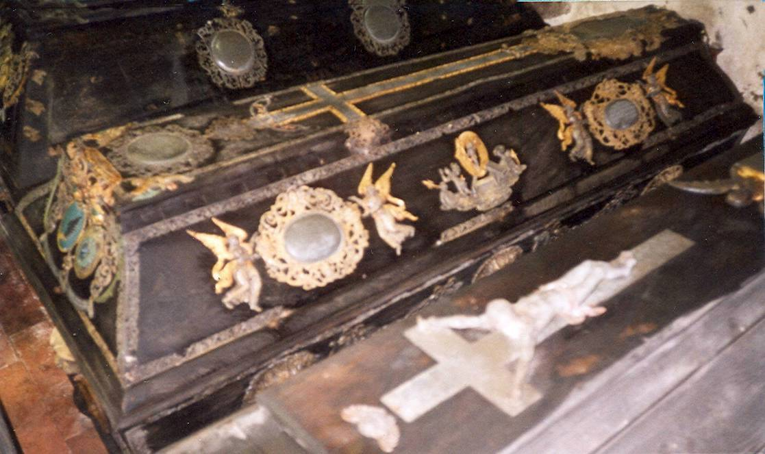 Särge in der Grabkapelle der Pressentins in Prestin, Landkreis Ludwigslust-Parchim, Mecklenburg-Vorpommern, Deutschland